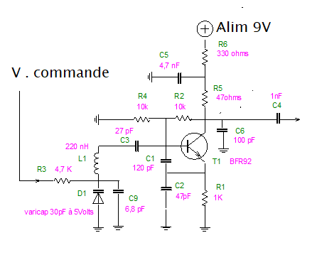 VCO 80 MHz .